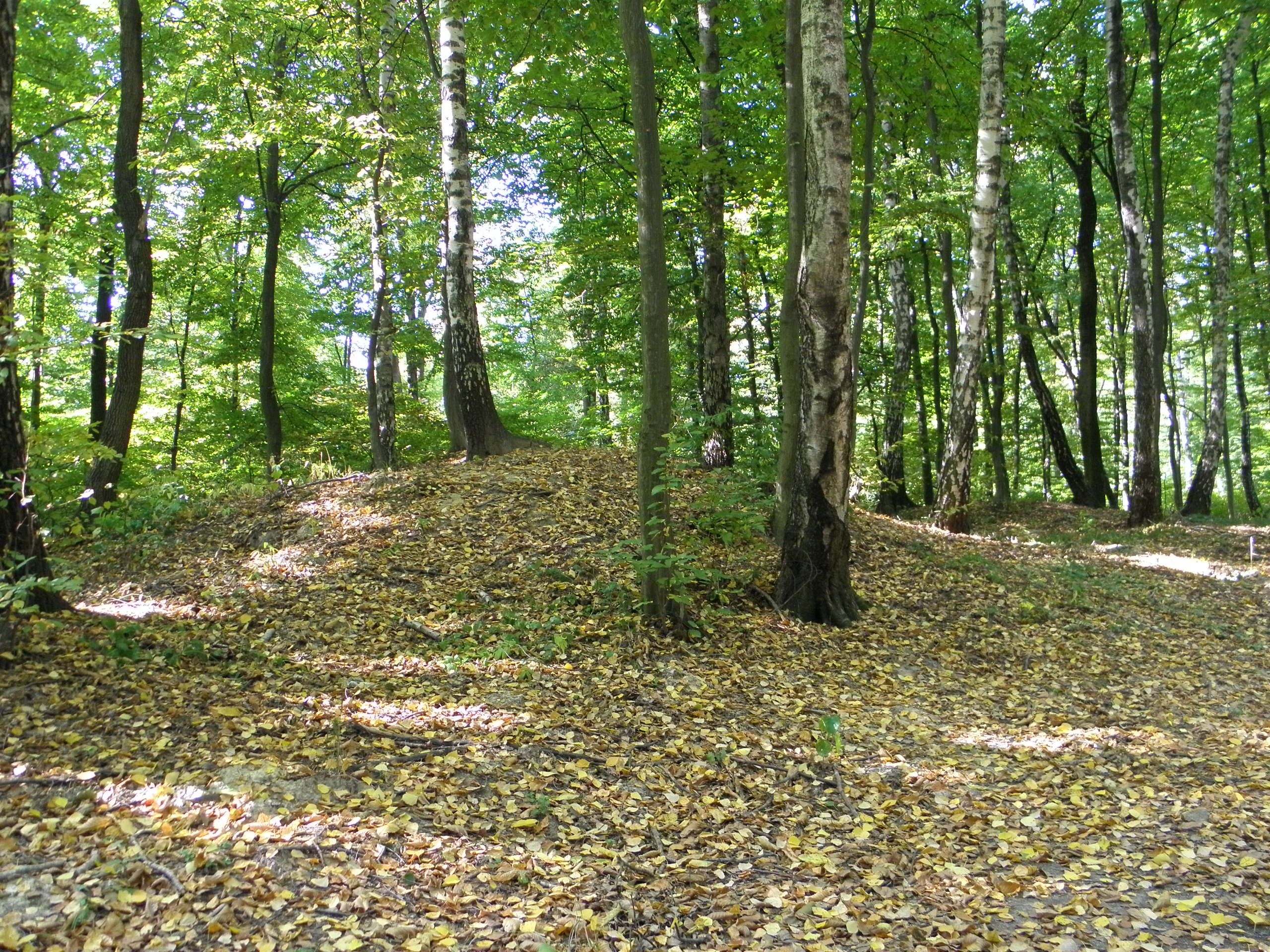 Kleczanów - widoczne dwa kurhany wczesnośredniowieczne. Przypuszcza się, że cmentarzysko sięga VIII w n.e. W pobliskiej wsi odkryto relikty osady z tego właśnie okresu. W niektórych kurhanach ślady inhumacji (kolejnych pochówków na istniejących już grobach).